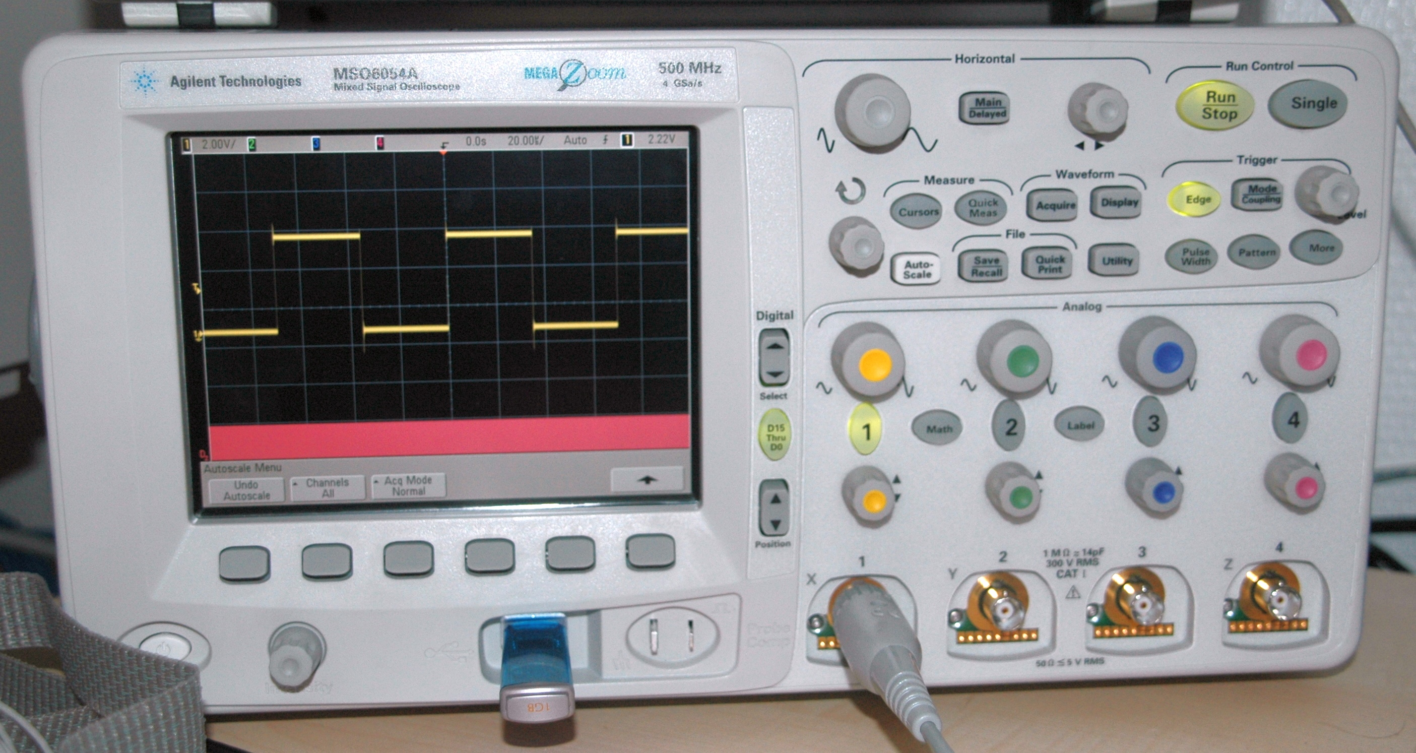 Modernes Speicheroszilloskop von Agilent (MSO6054A) mit integriertem Spektrumanalysator/Logikanalysator 500Mhz Bandbreite